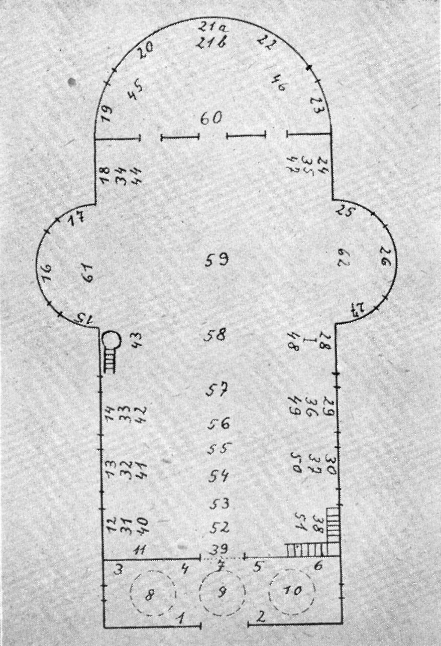 Distributia picturilor murale realizate de Misu Popp in Biserica Adormirea Macii Domnului din Satulung. Schita facuta de Virgil Vatasianu.